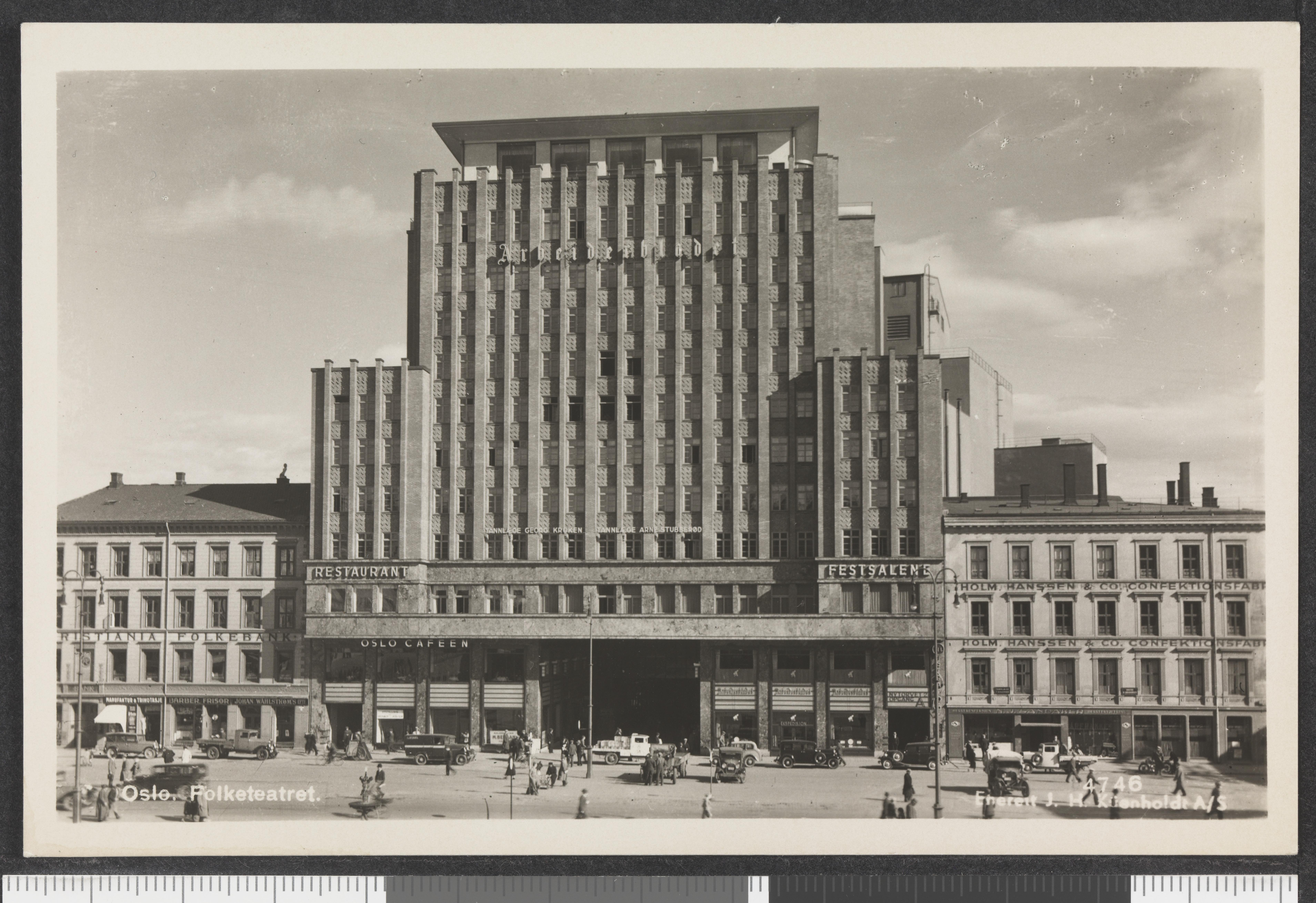 Bildet er hentet fra Nasjonalbibliotekets bildesamling Folketeateret,Youngstorget, Oslo, Oslo